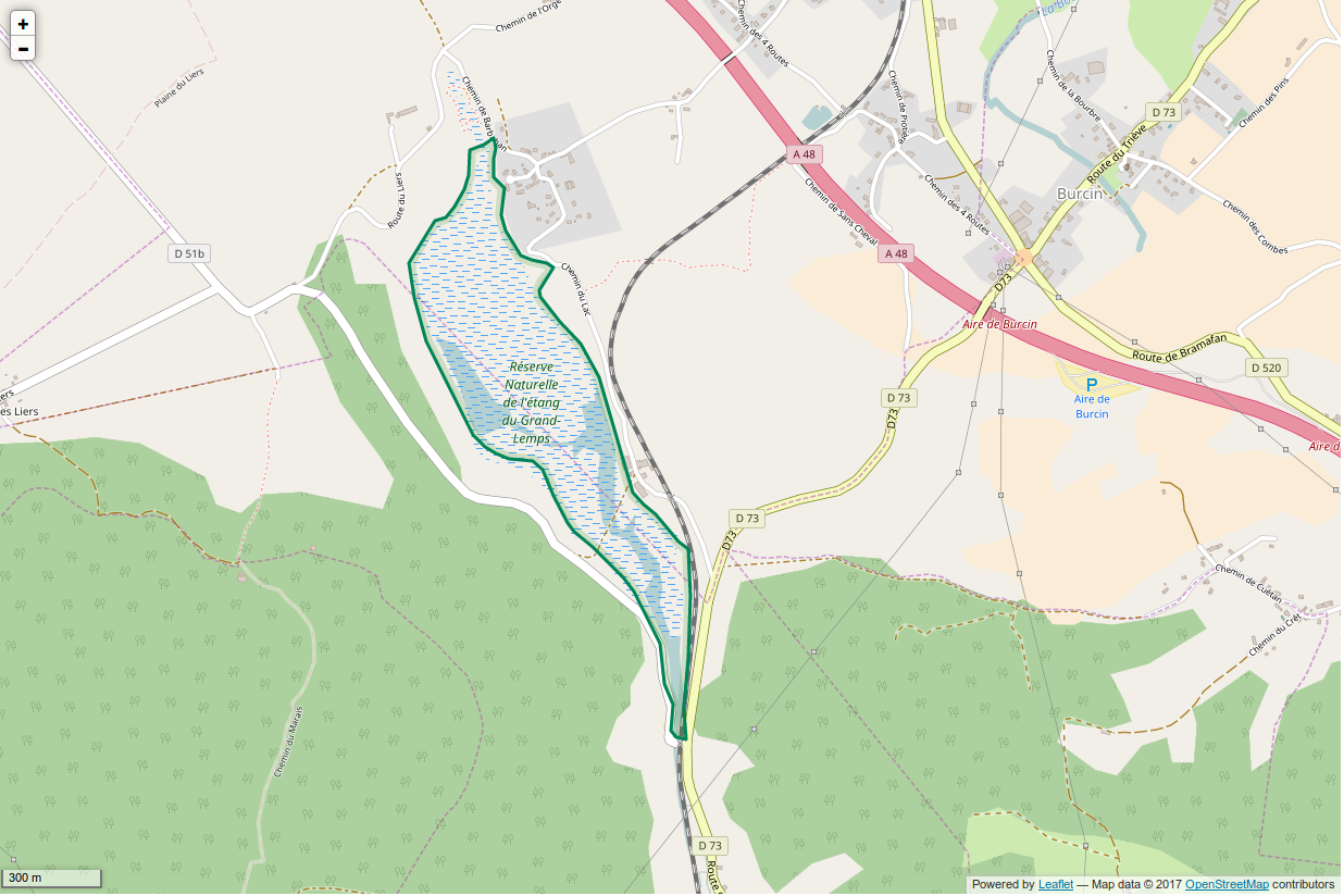 Périmètre de la RNN de l'Etang du Grand-Lemps.